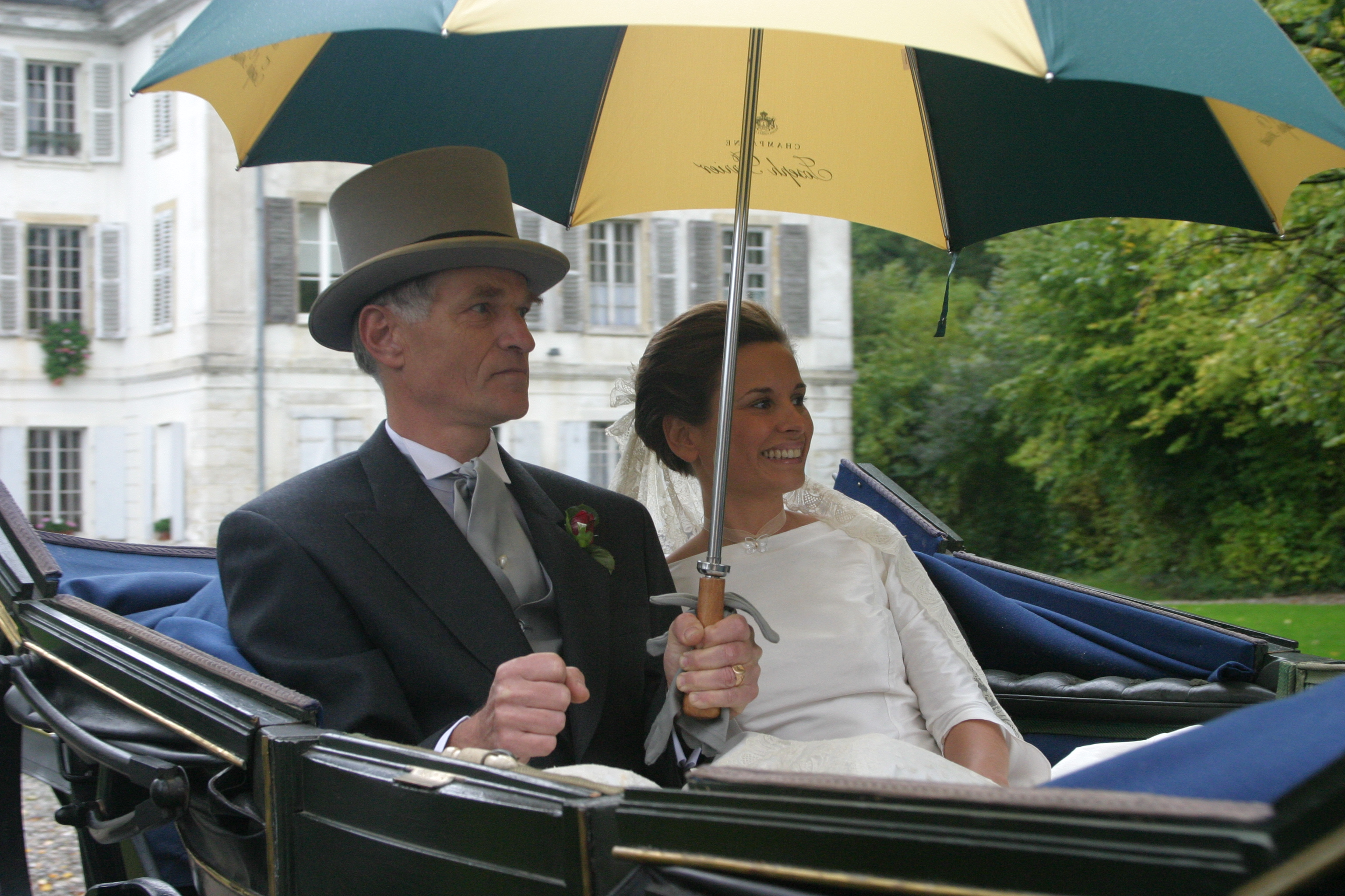 Philippine.anthony_010.jpg